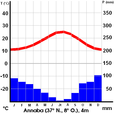 Climat Annaba Algerie